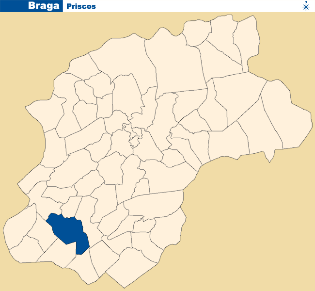 Localização de Priscos no concelho de Braga.